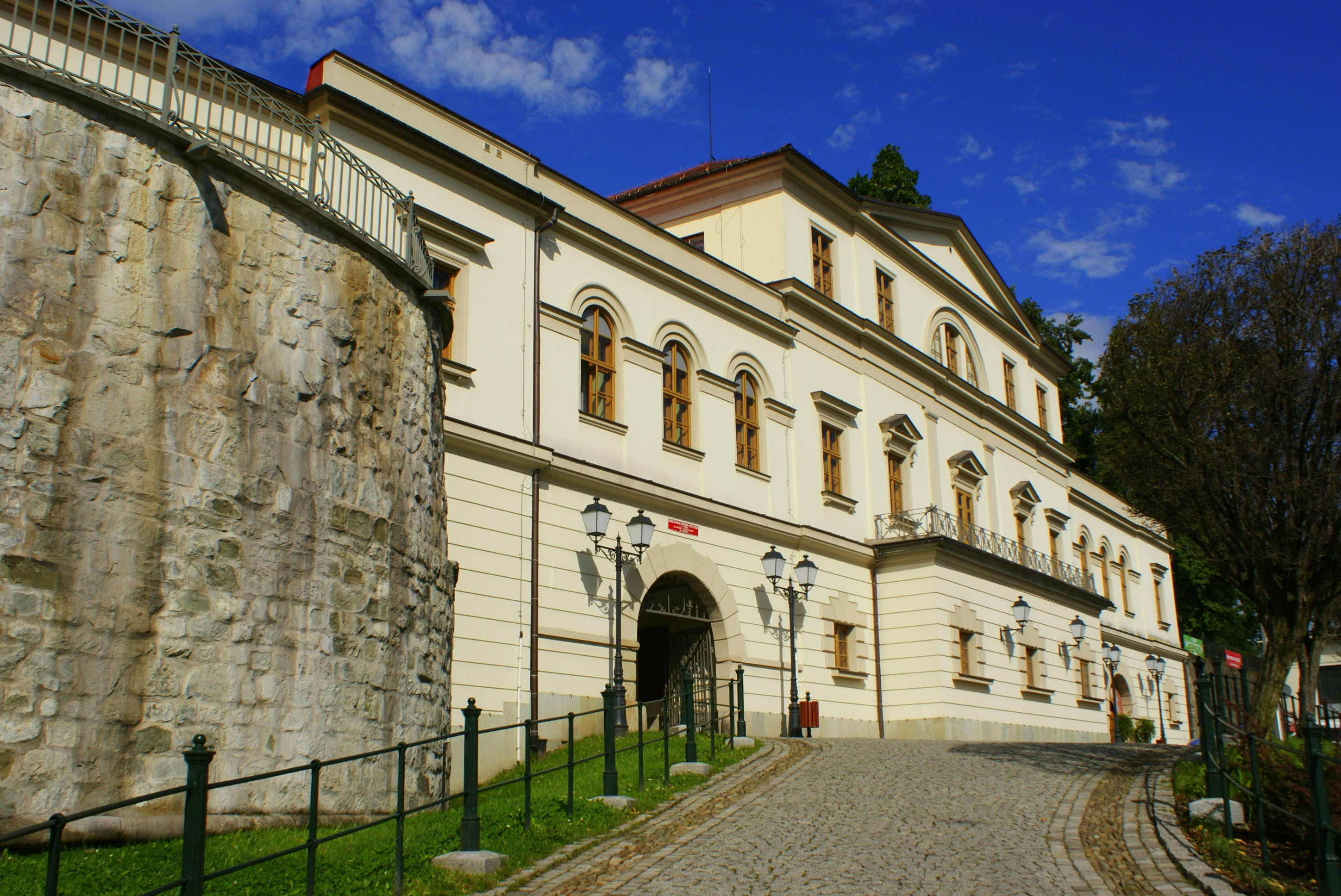 Zamek w Cieszynie